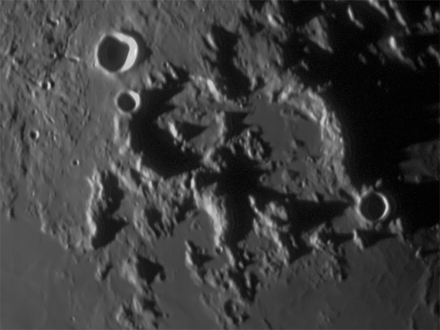 Krater Arzachel (links). Durchmesser: ca. 50Km.